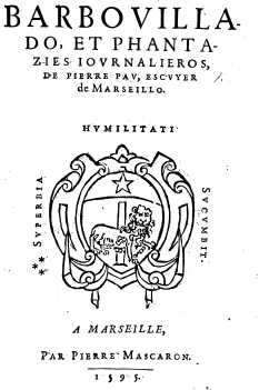 Page de l'athologie des écrivain provençaux occitans Pierre Paul et Louis Bellaud